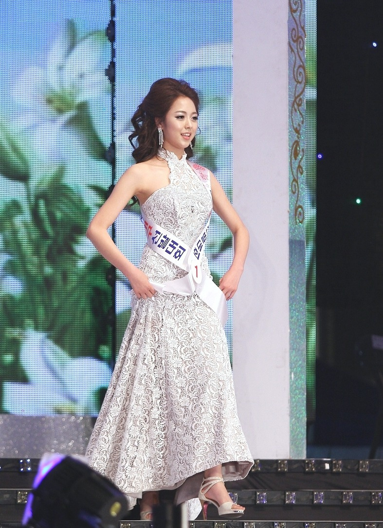 2013 미스 대구 진 유예빈